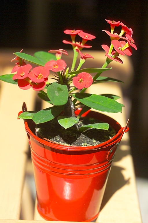 Euphorbia milii, Paris.